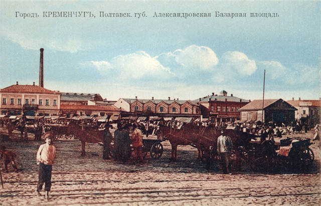 Postcards of old Kremenchuk. Олександрівська базарна площа.